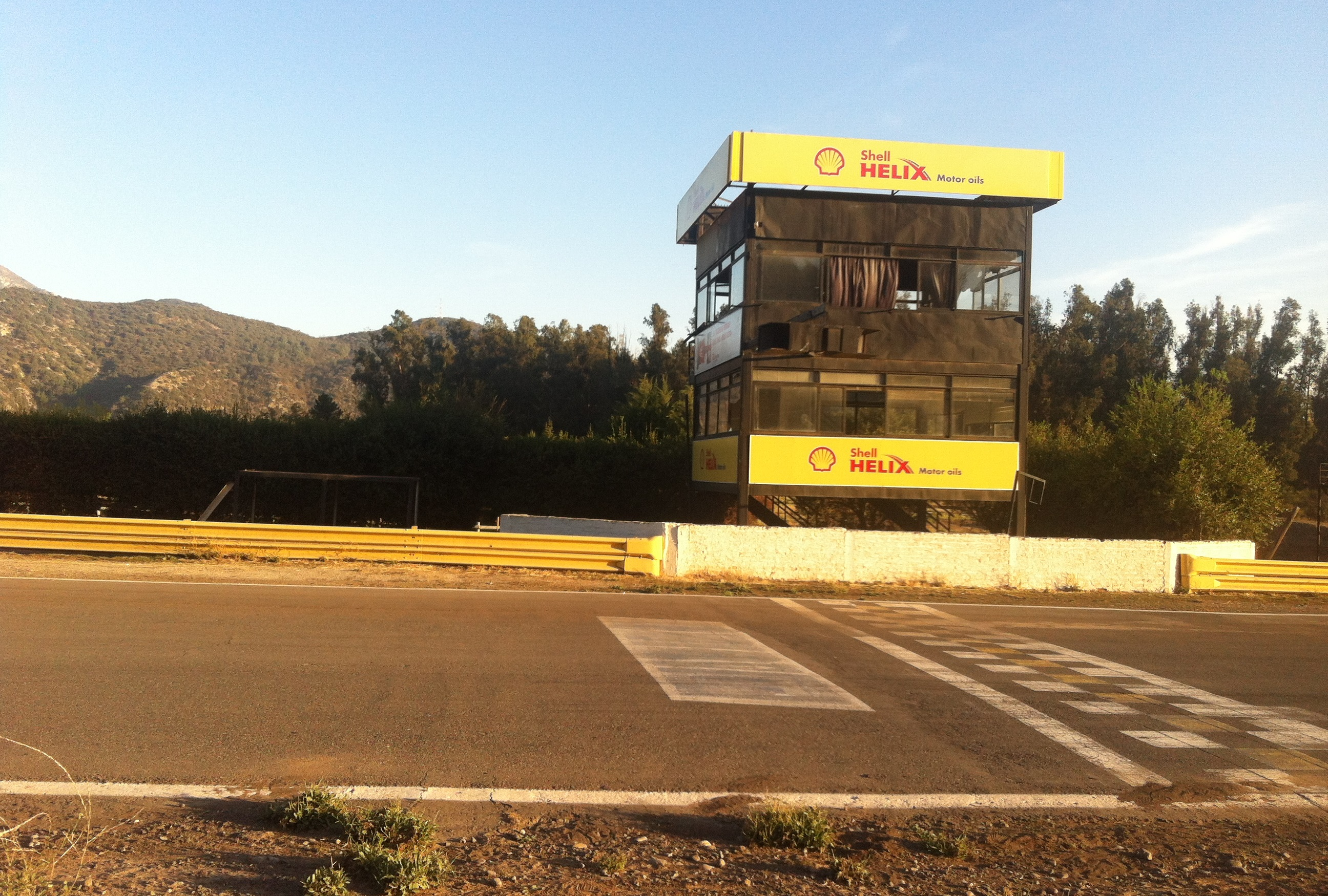 Autódromo Las Vizcachas